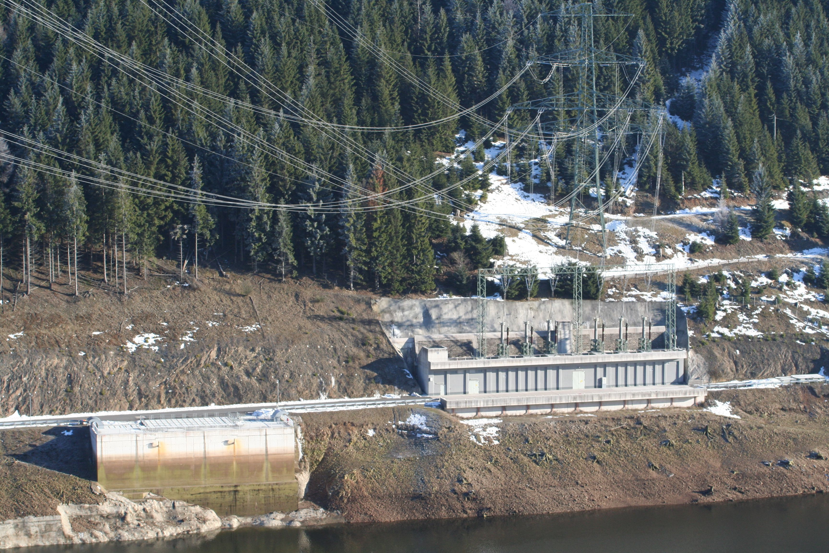 Unterbecken des PSW in Goldisthal, Landkreis Sonneberg; 380-kV-Anbindung